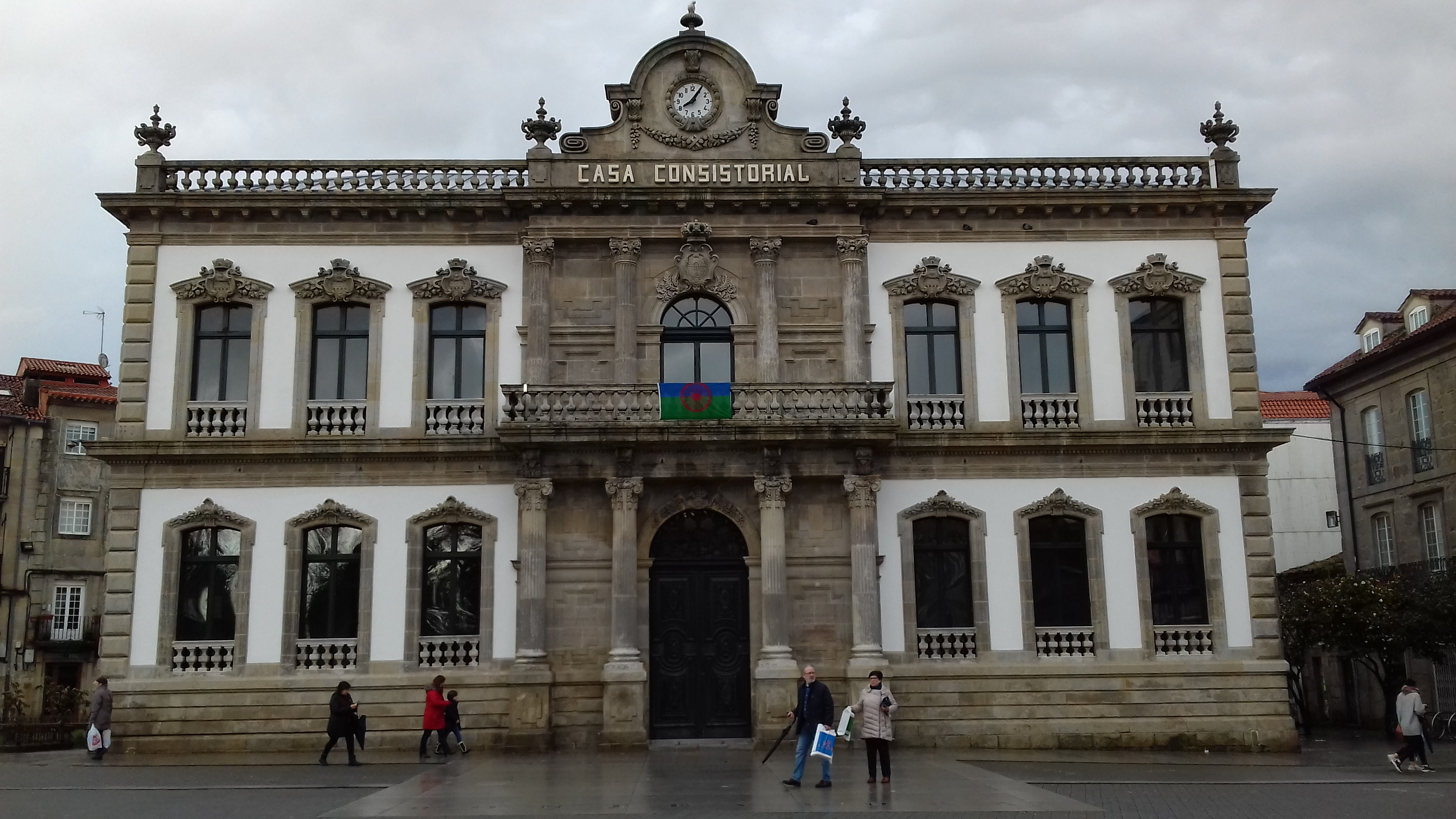 Casa Consistorial de Pontevedra coa bandeira do pobo xitano